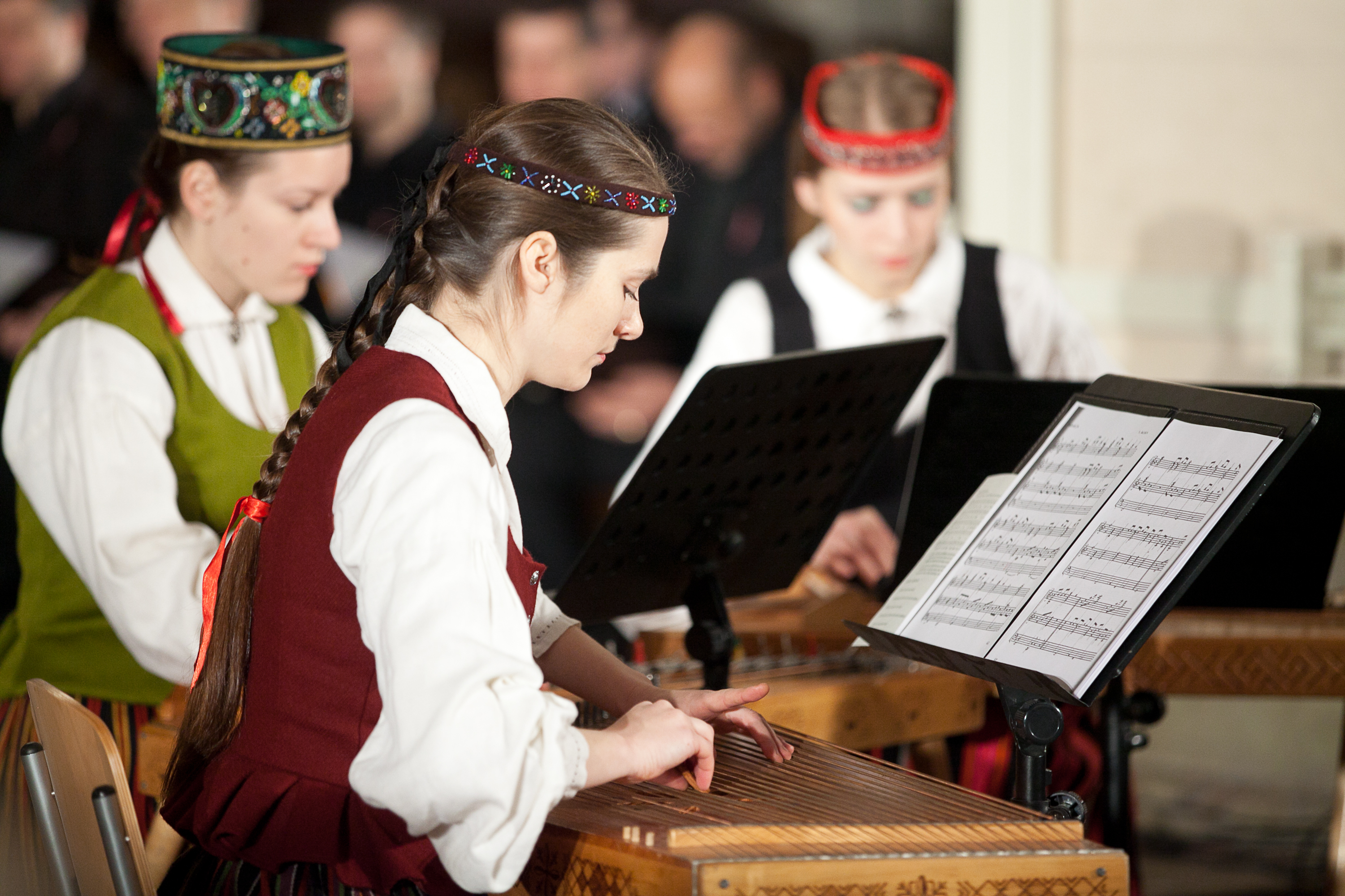 2012.gada 18.novembris. Doma baznīcā notiek ekumēniskais dievkalpojums, kas veltīts Latvijas Republikas proklamēšanas 94.gadadienai. Foto: Ernests Dinka, Saeimas Kanceleja.